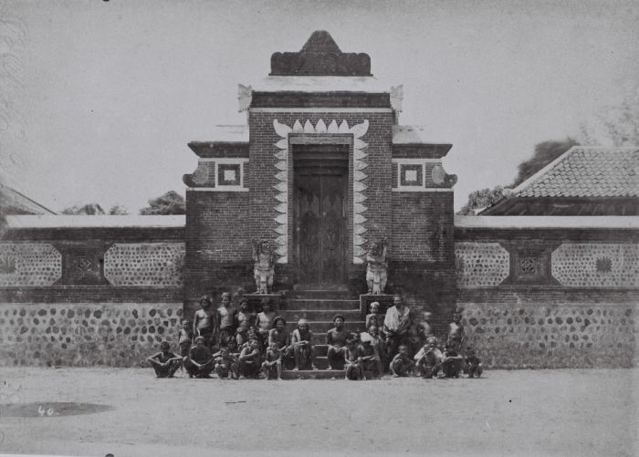 foto. Foto is (mogelijk) genomen tijdens de Lombok-expeditie. Groepsportret bij de poort van de pura in Lingsar